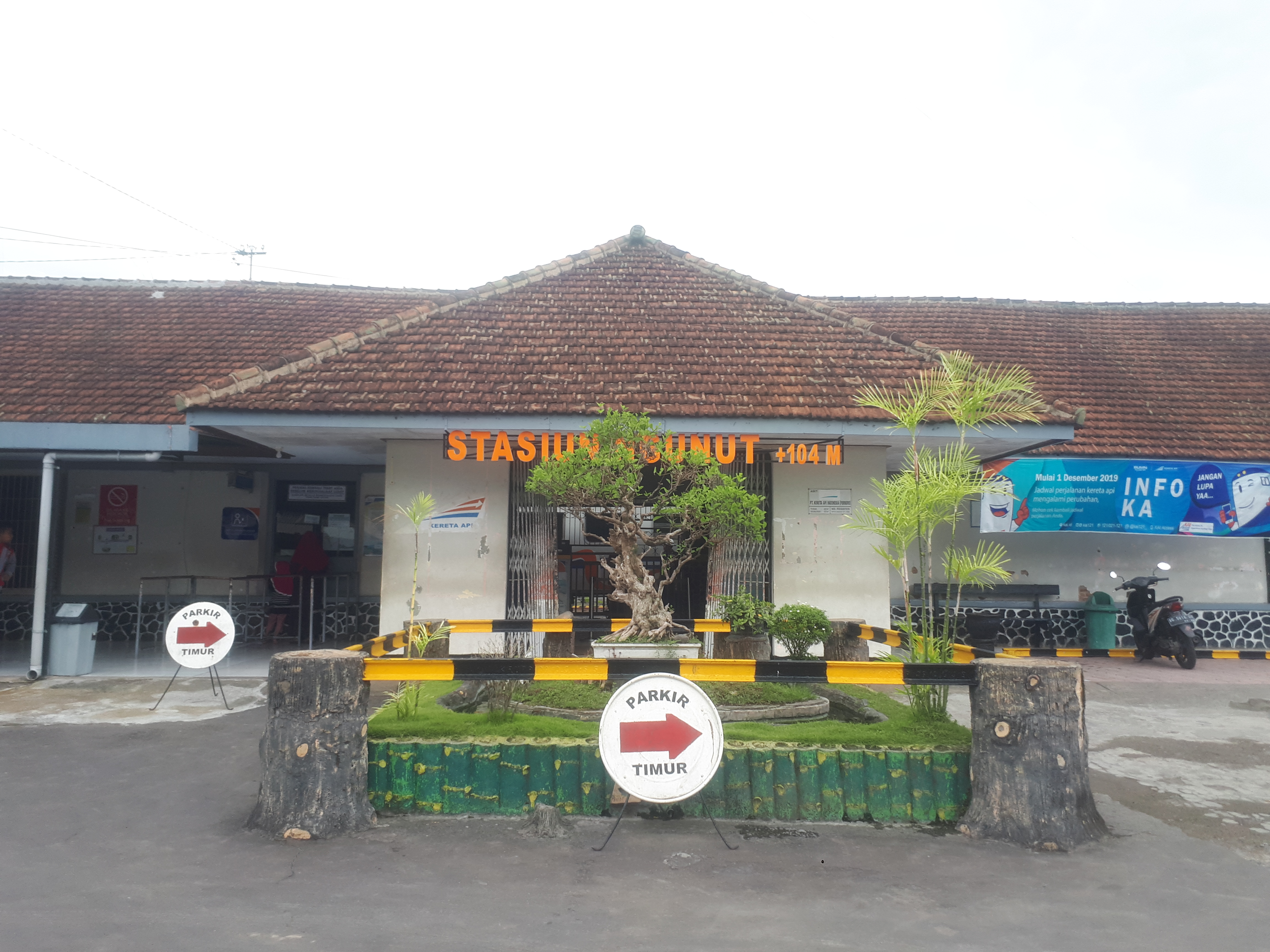 Tampak depan Stasiun Ngunut pada tahun 2020